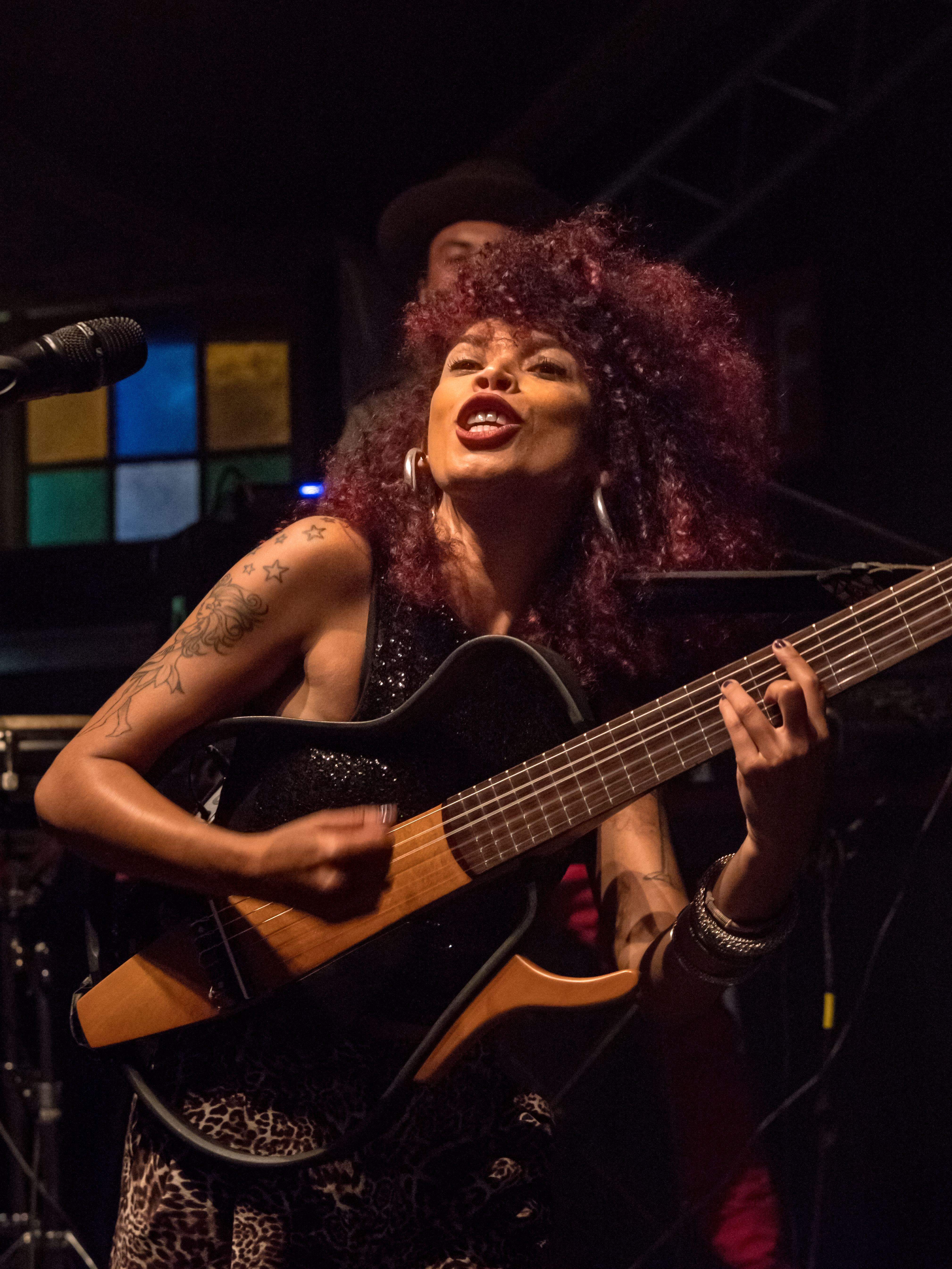 Bilder vom Zelt Musik Festival 2016 in Freiburg im Breisgau Flavia Coelho